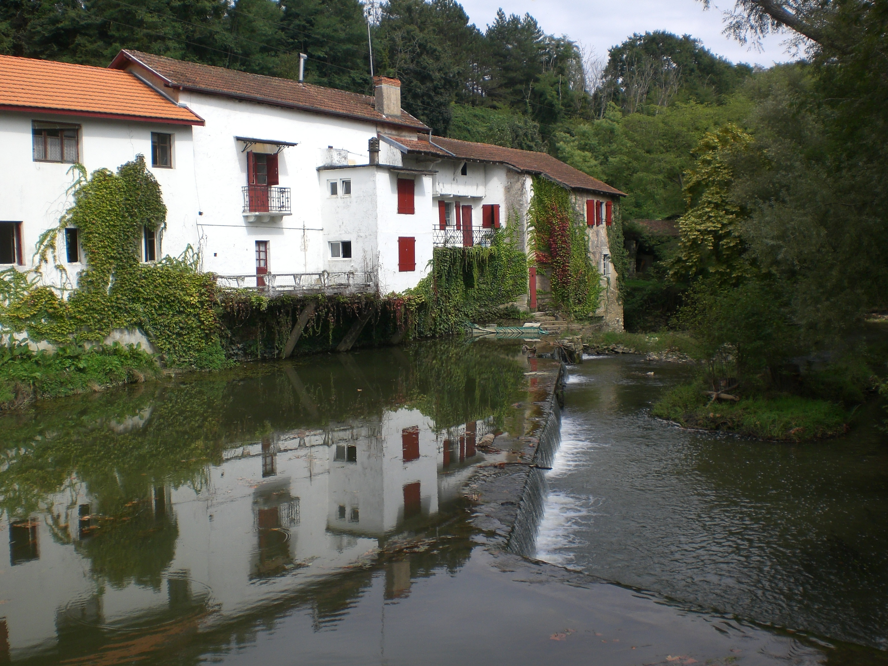 Lihurri ibaia Bidaxunen